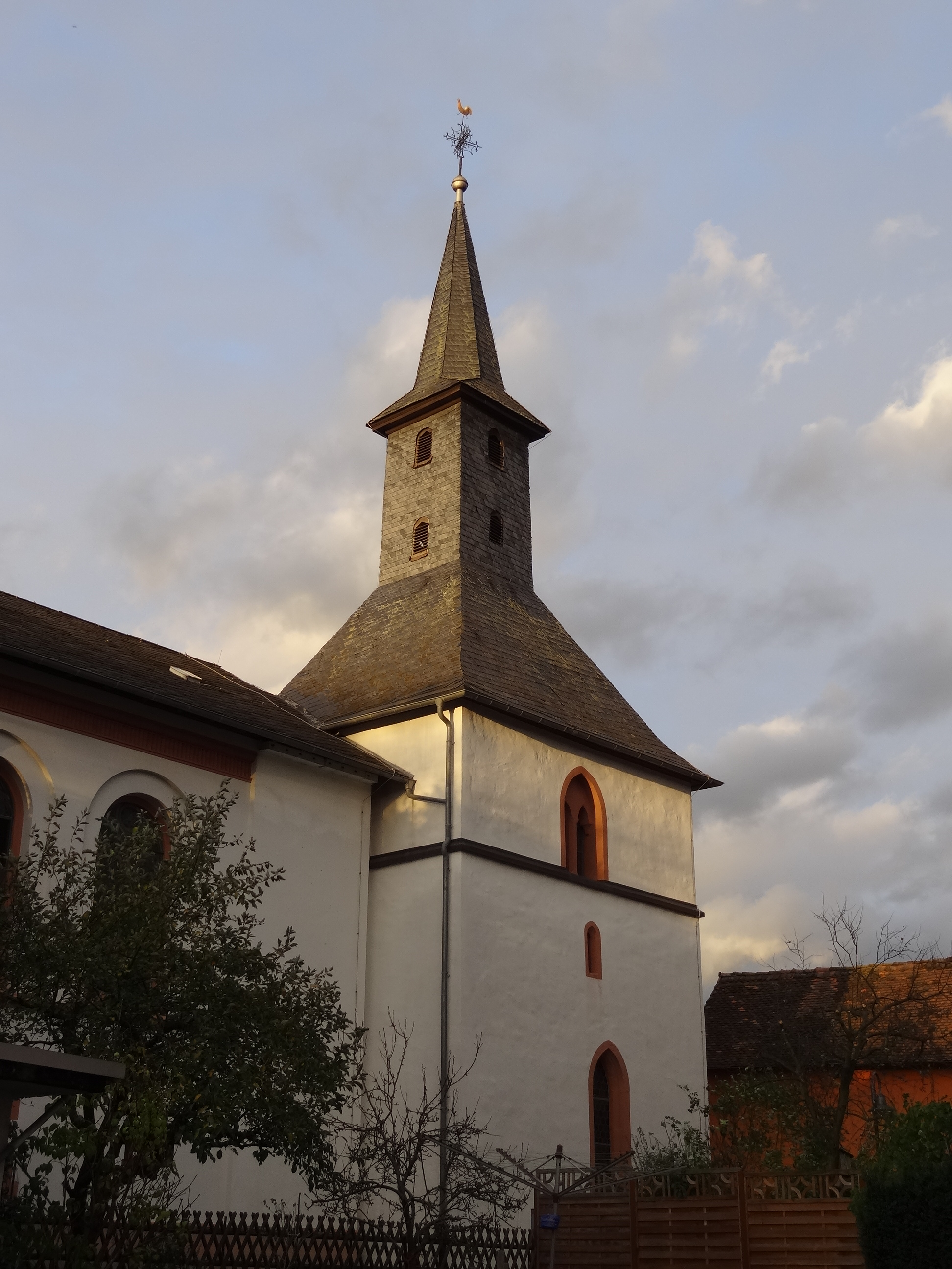 Evangelische Pfarrkirche Langd